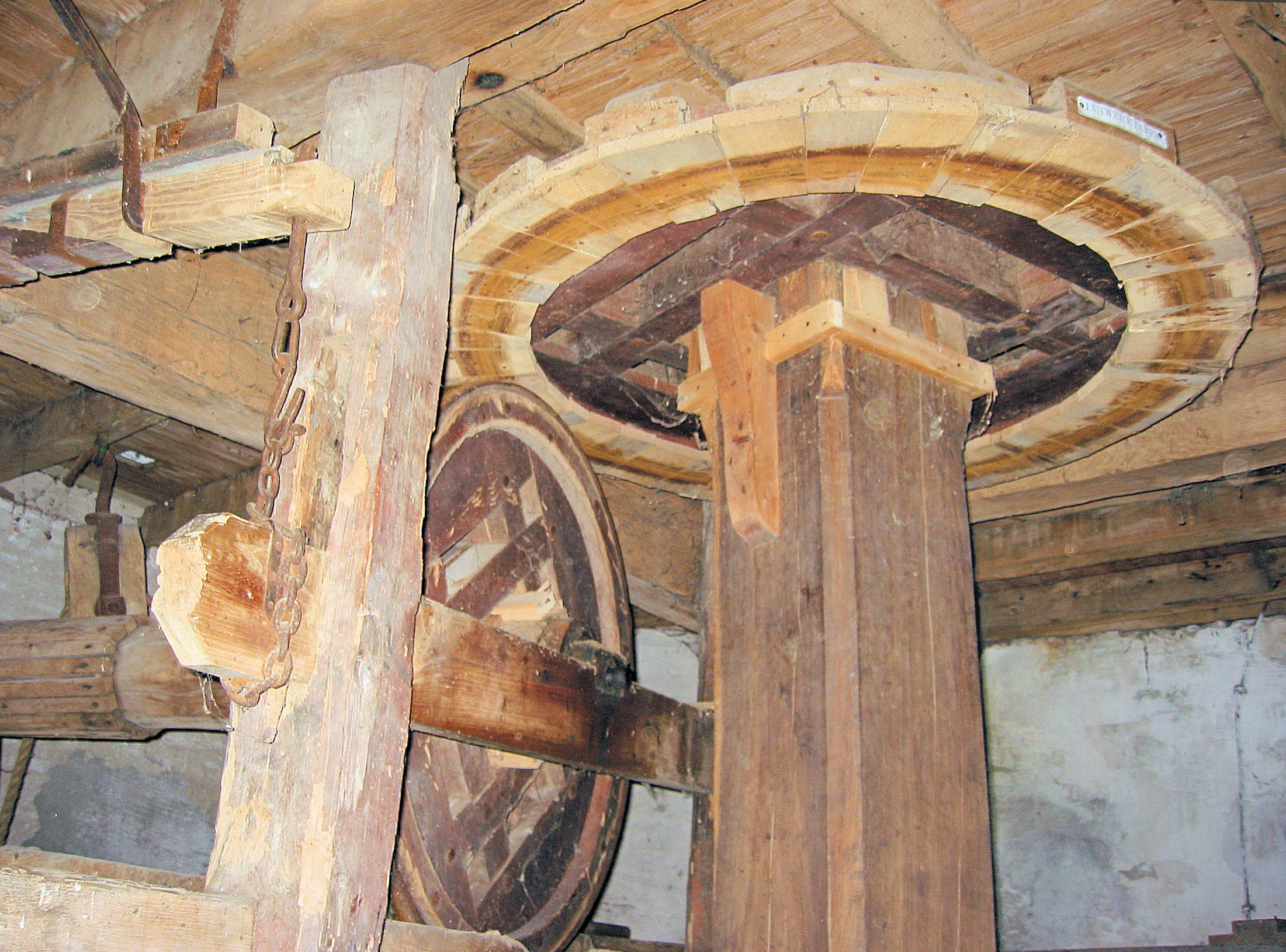 Molen De Zwaan luiwerk, Lienden, Gelderland, the Netherlands